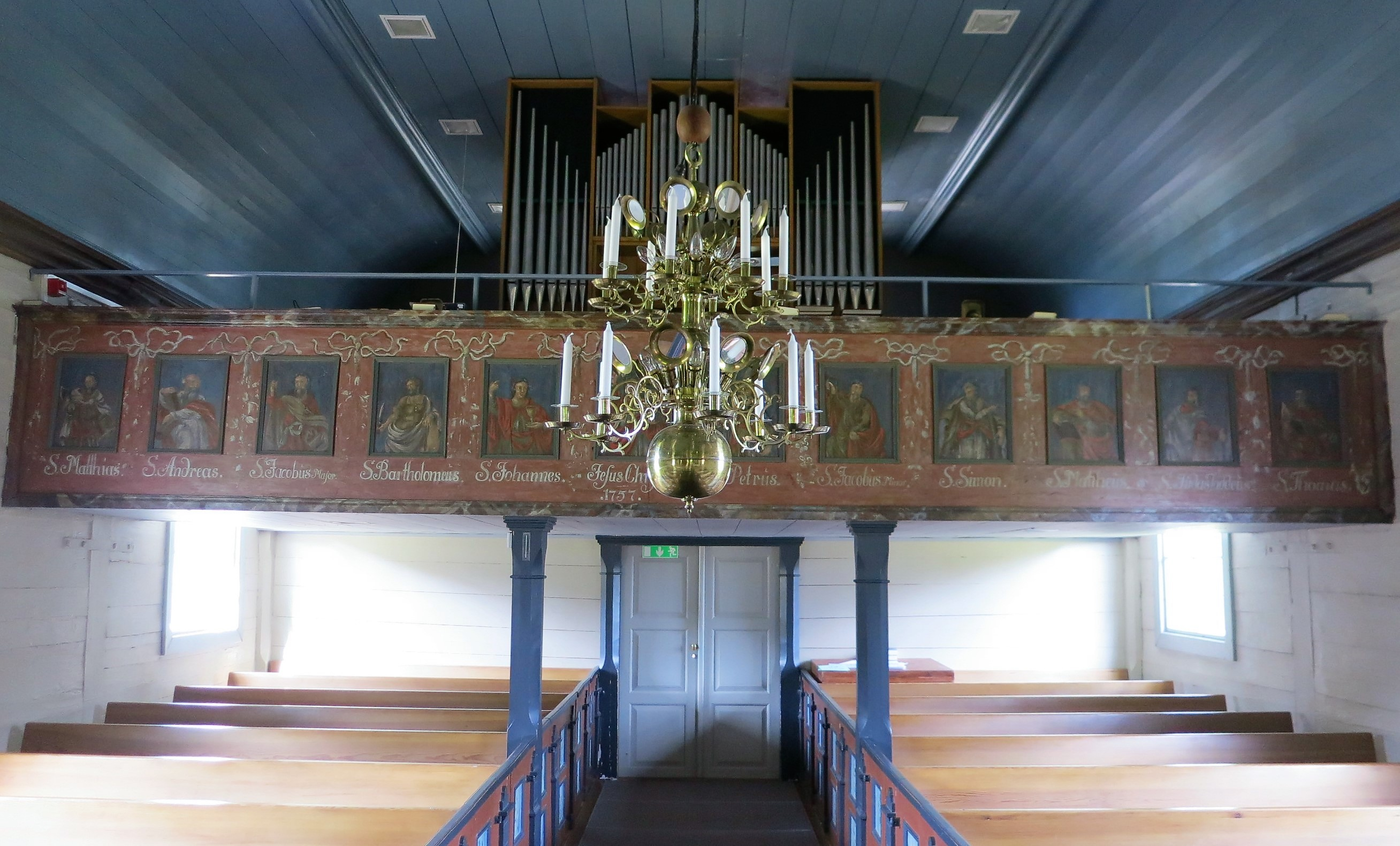 Orgelläktare i Norra Hestra kyrka, Växjö stift, Småland